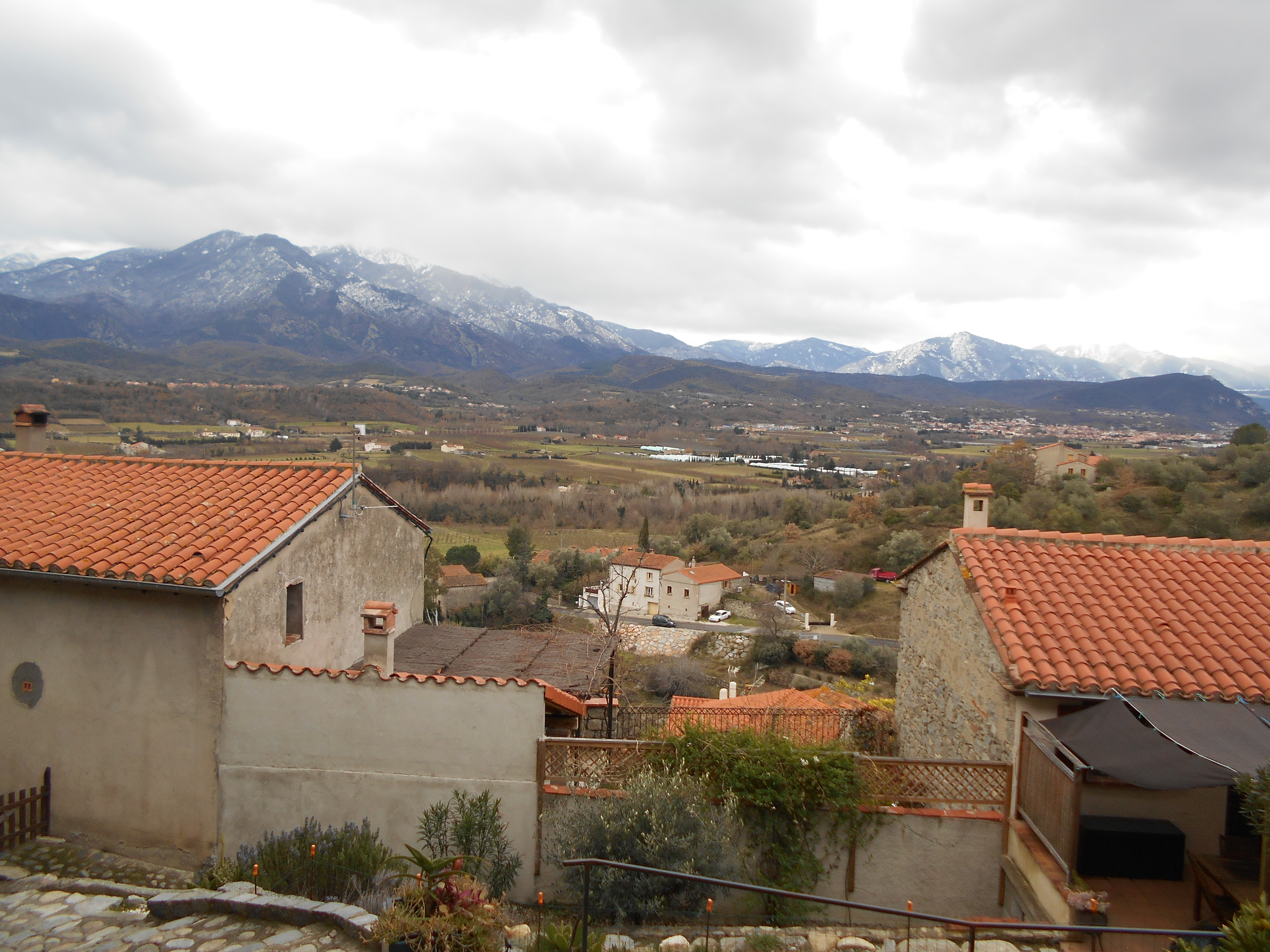 Vista general del Lliscó, zona sud-oest del terme d'Eus.